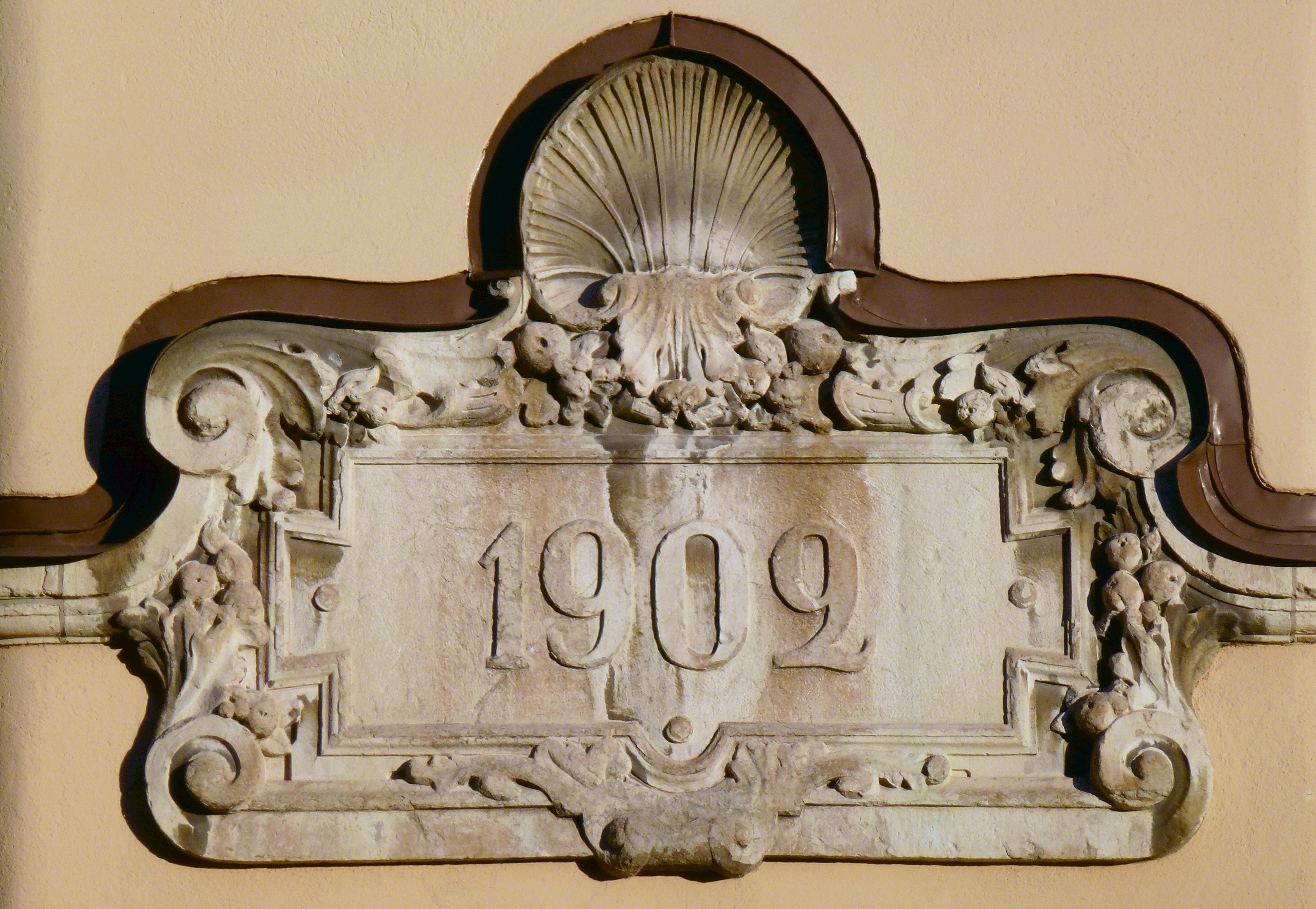 Maria brandstation, årtal